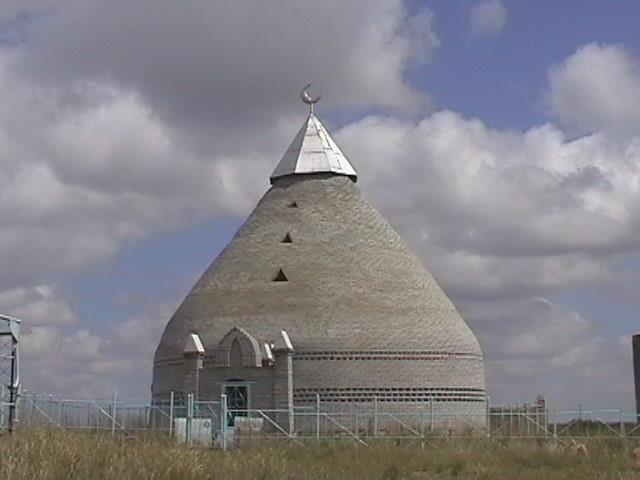 Қазақша (кирил): Жидебай әулие күмбезі